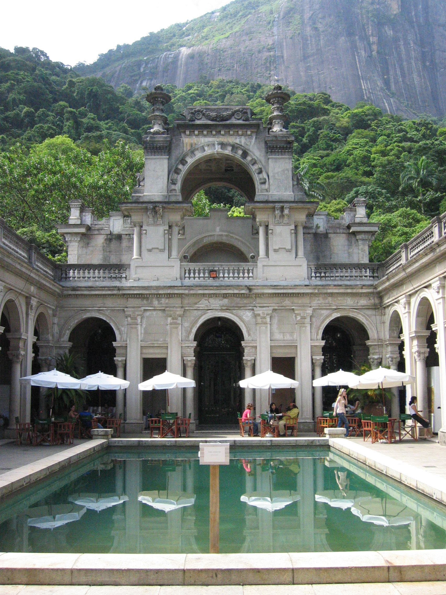 Parque Lage in Rio de Janeiro, Brazil